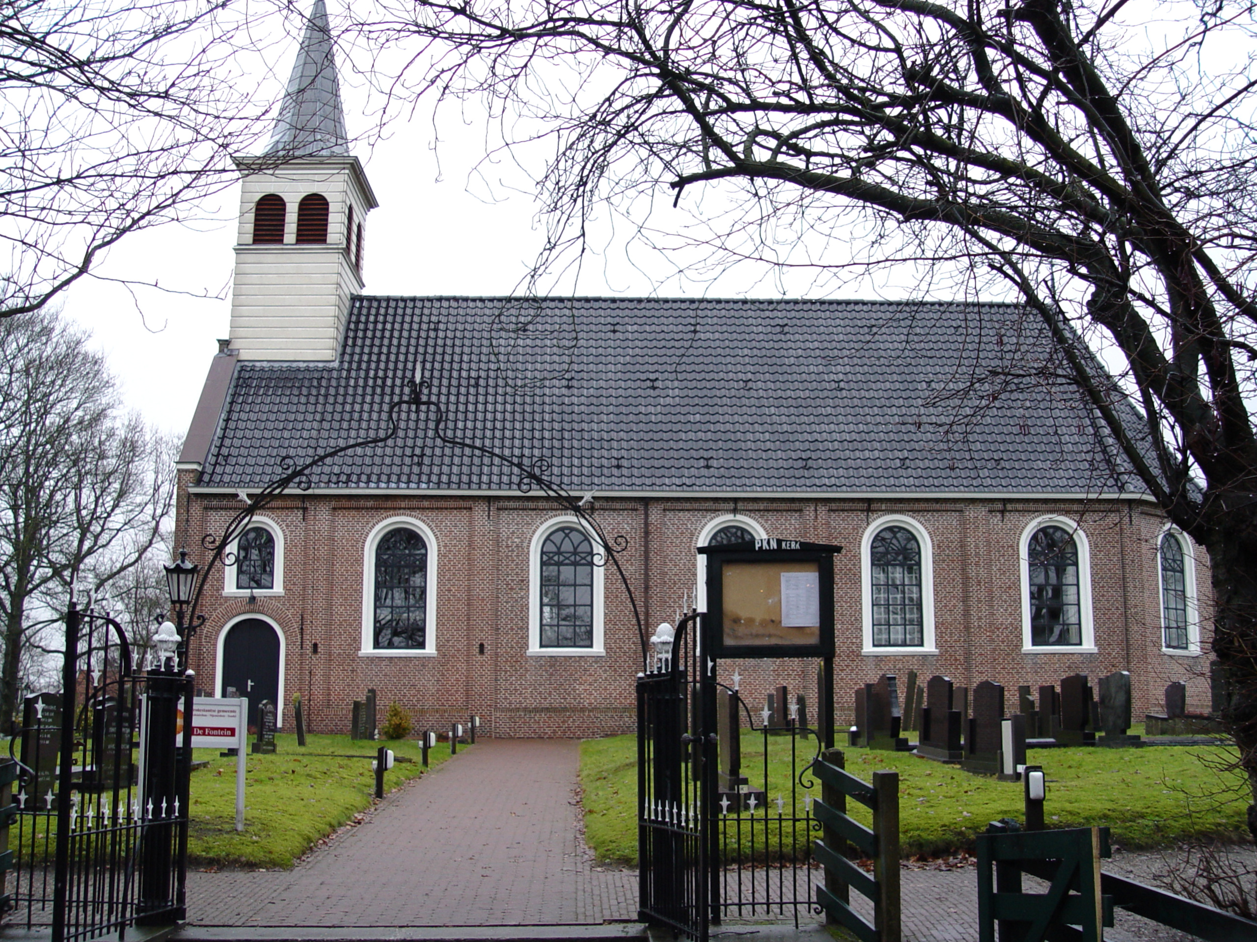 Gaasterlân-Sleat - Oudemirdum - Hervormde kerk - De Fontein